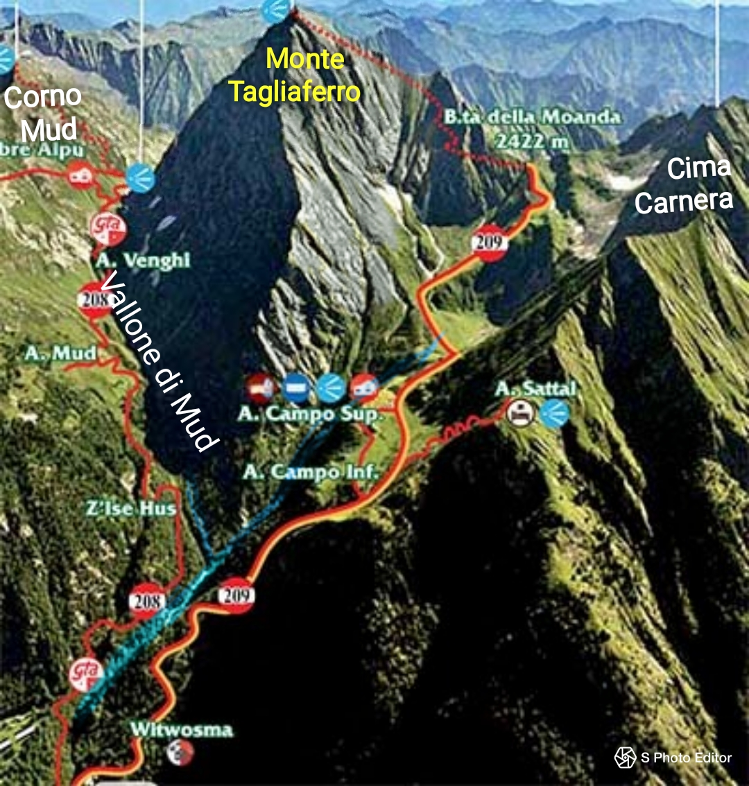 Vallone di Mud con Monte Tagliaferro, colle Mud, Cima Carnera